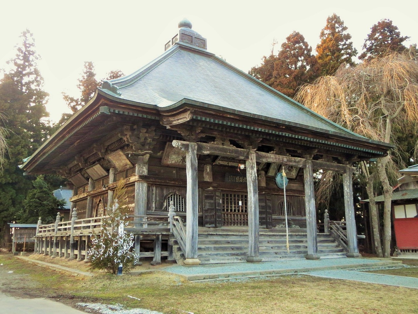 栗原市にある双林寺瑠璃光殿 Canon IXY 3